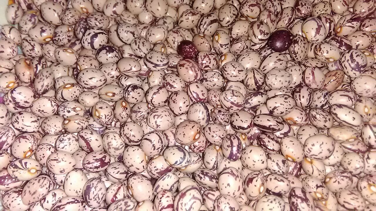 Questa foto rappresenta il fagiolo con striature rosse tipico della zona di Pignola di Basilicata